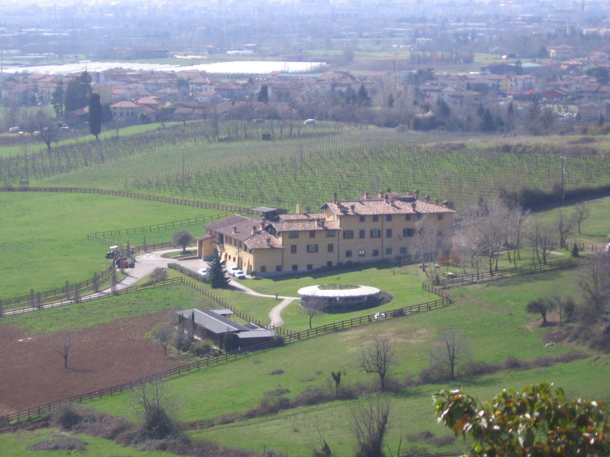 Cascina Maffioli, Scanzorosciate, Bergamo, Italy